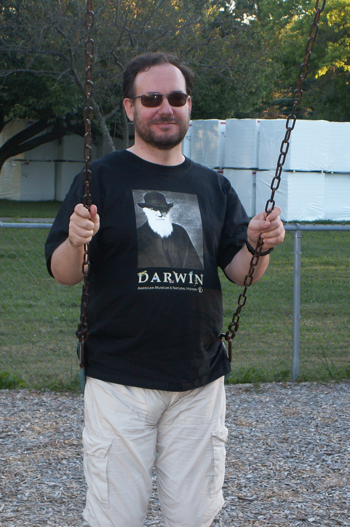 Karol Sabath